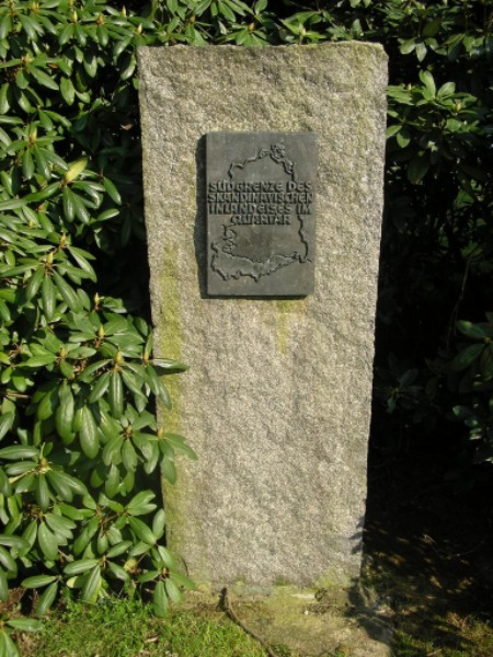 Gedenkstein im Stadtpark Chemnitz mit der Inschrift: „Südgrenze des skandinavischen Inlandeises im Quartär“